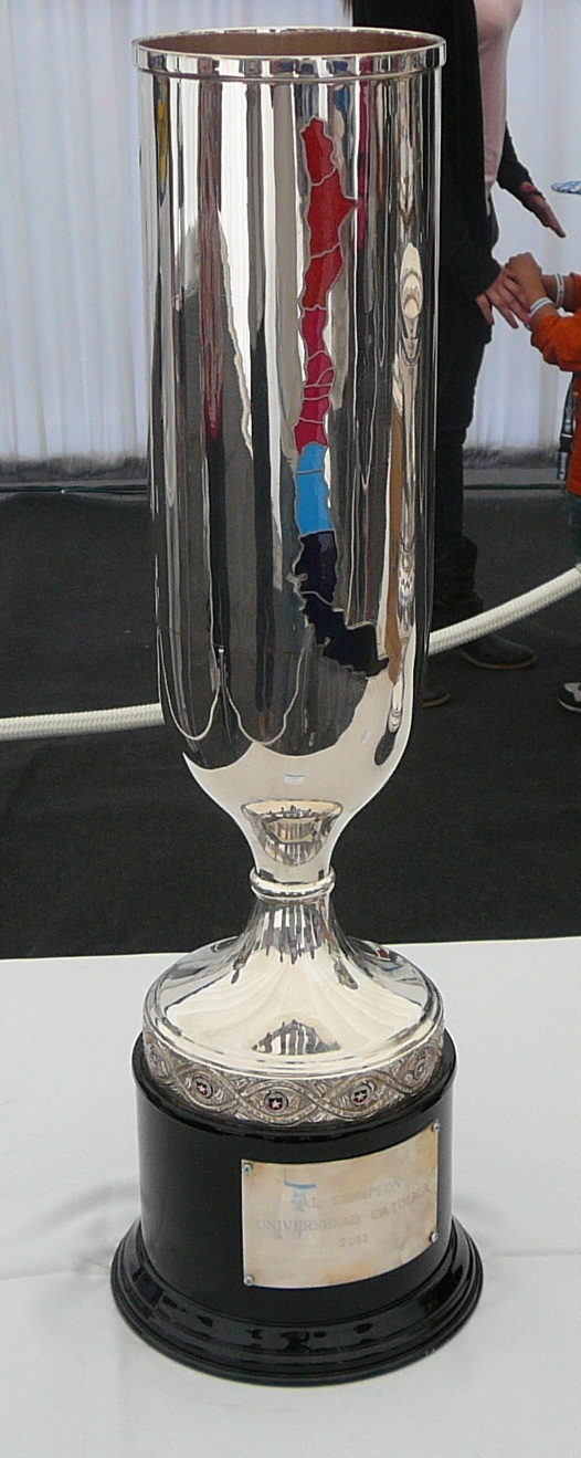 Réplica de la Copa Chile ganada por Universidad Católica el 2011